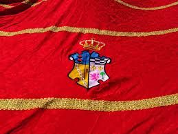 Bandera del pendón local de Fresnedo del Sil.